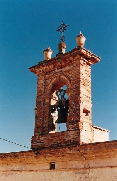 Campanario antiguo de Segart